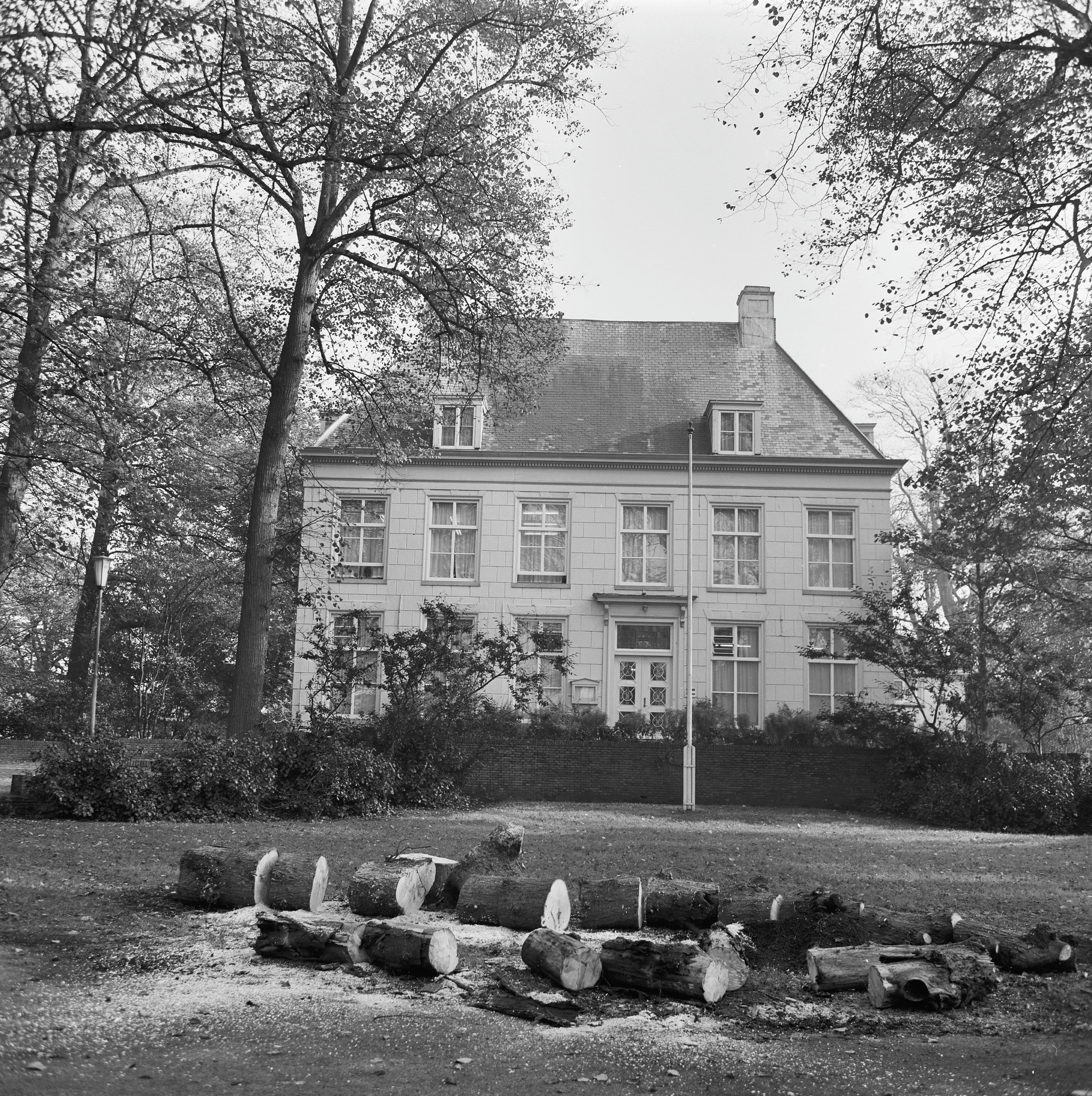 Raadhuis: aanzicht Hoofdstraat